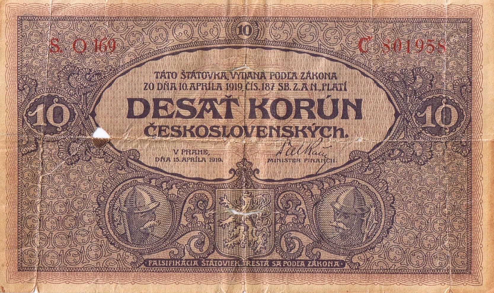 10 Coronas Checoslovacas